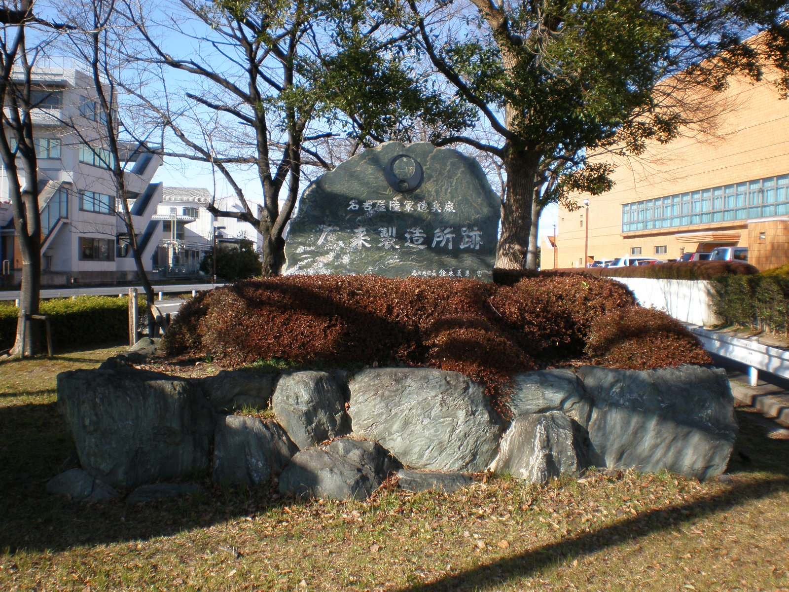 愛知県春日井市にかつてあった名古屋陸軍造兵廠・鷹来製造所跡を示す石碑